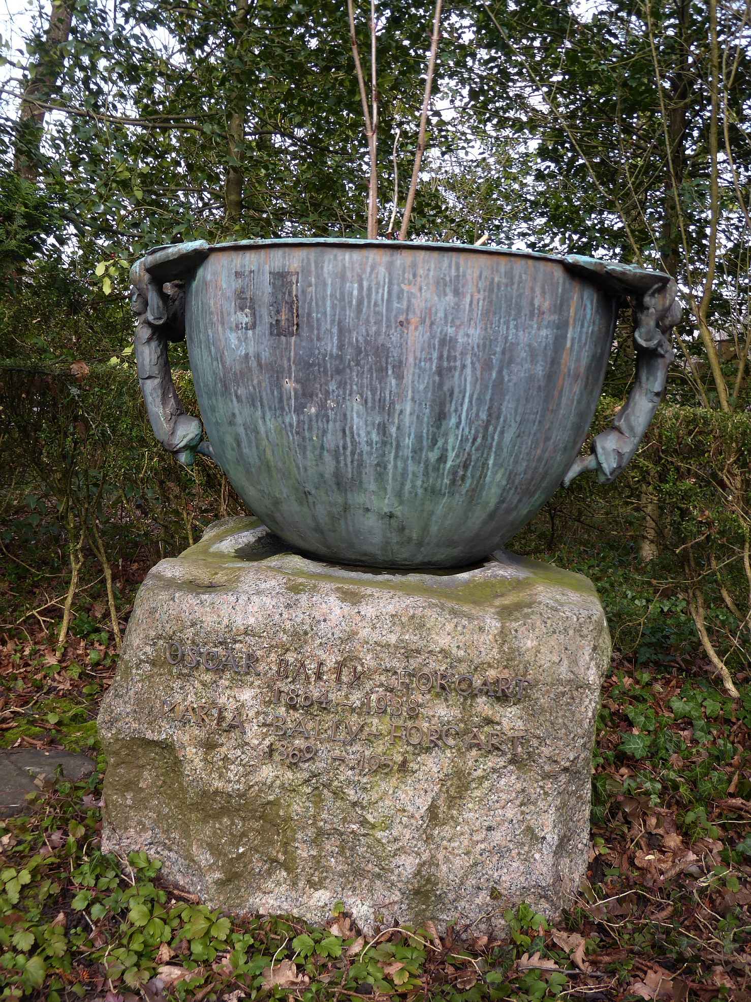 Oscar Bally-Forcart (1864–1938), Chemiker, Unternehmer und Gründer des Schweizer Nahrungsmittel-herstellers Haco, Familiengrab auf dem Friedhof Hörnli, Riehen, Basel-Stadt